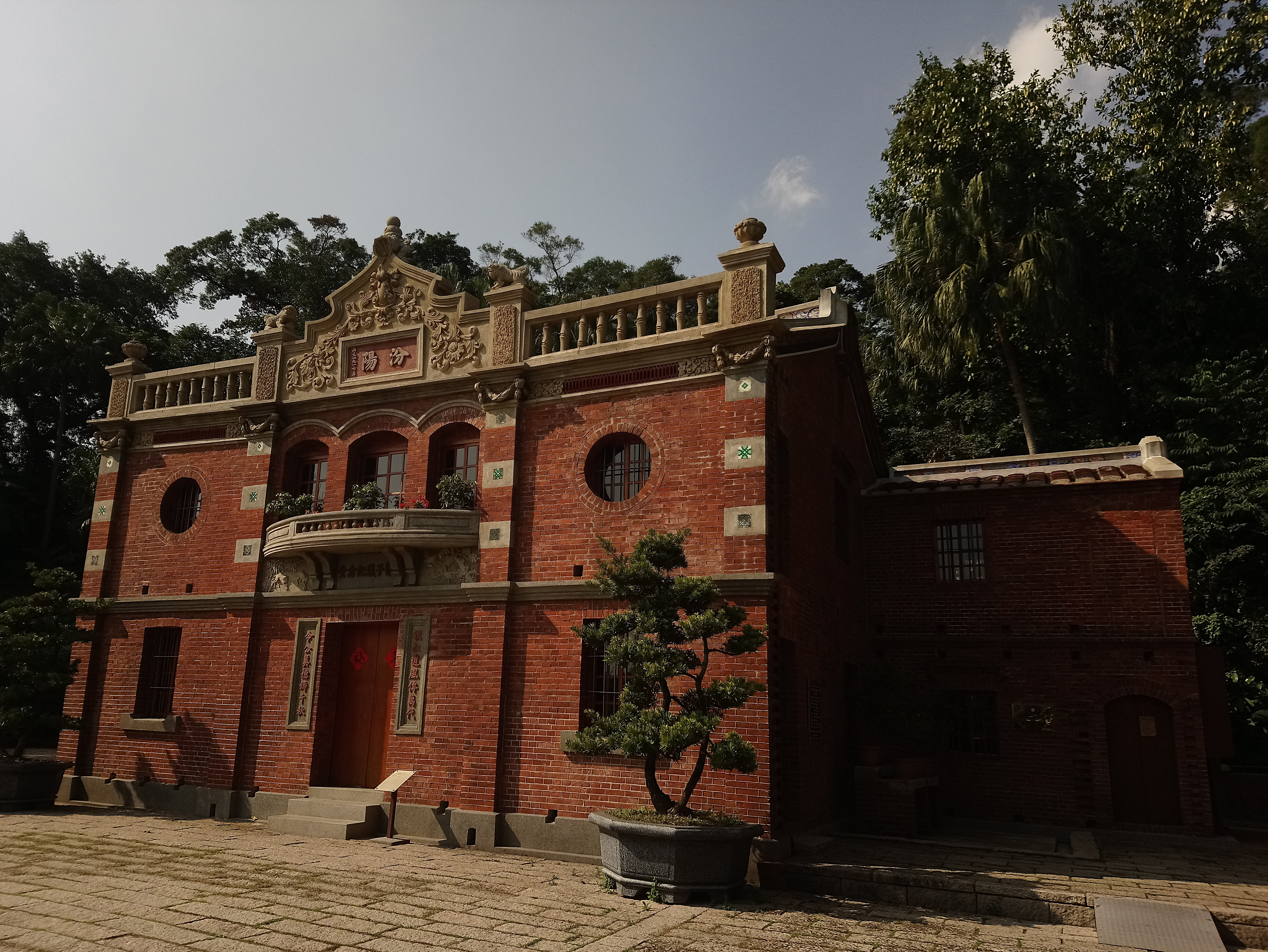 內湖郭氏古宅,台北市內湖區紫陽次分區紫陽里